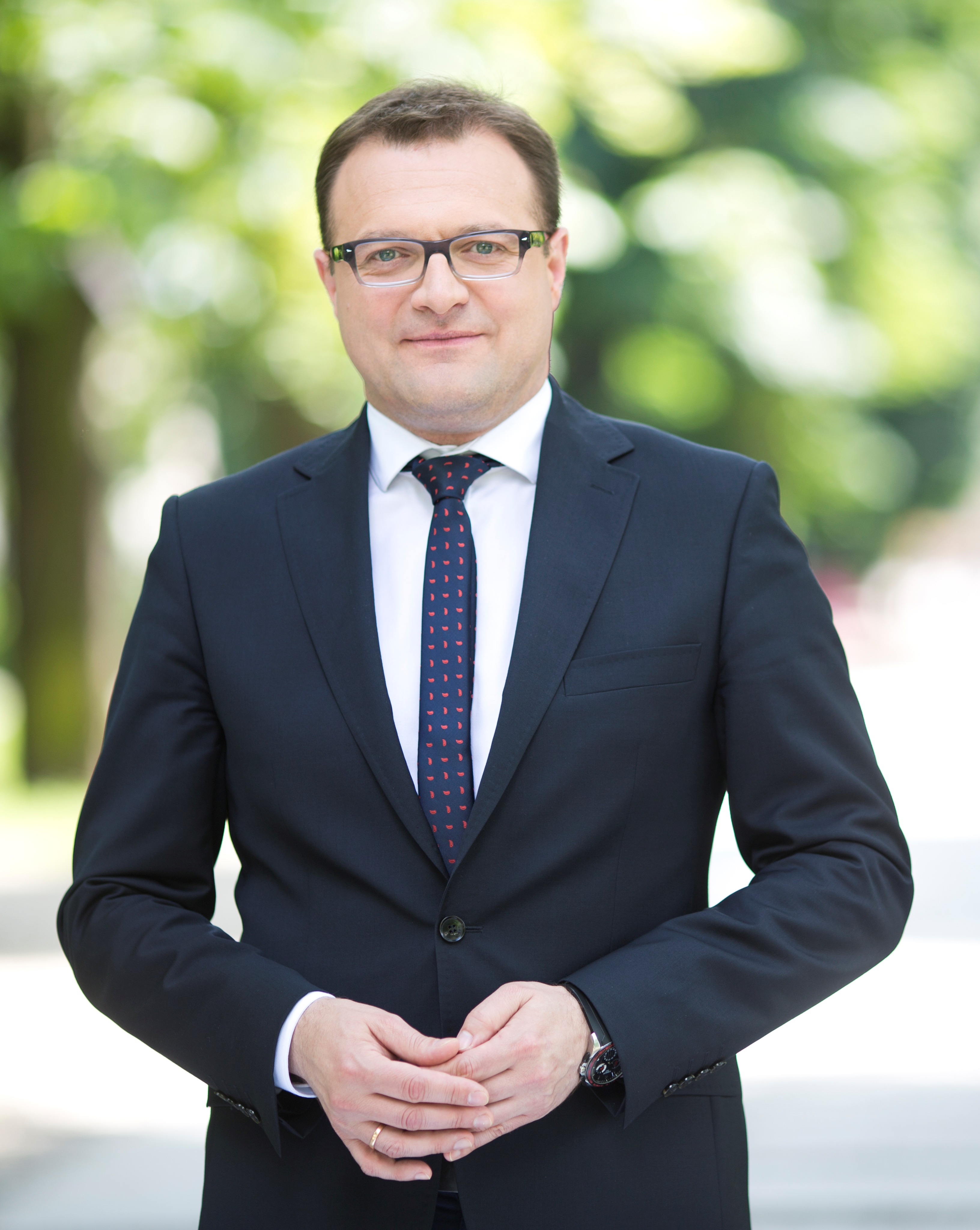 Prezydent Miasta Radomia Radosław Witkowski